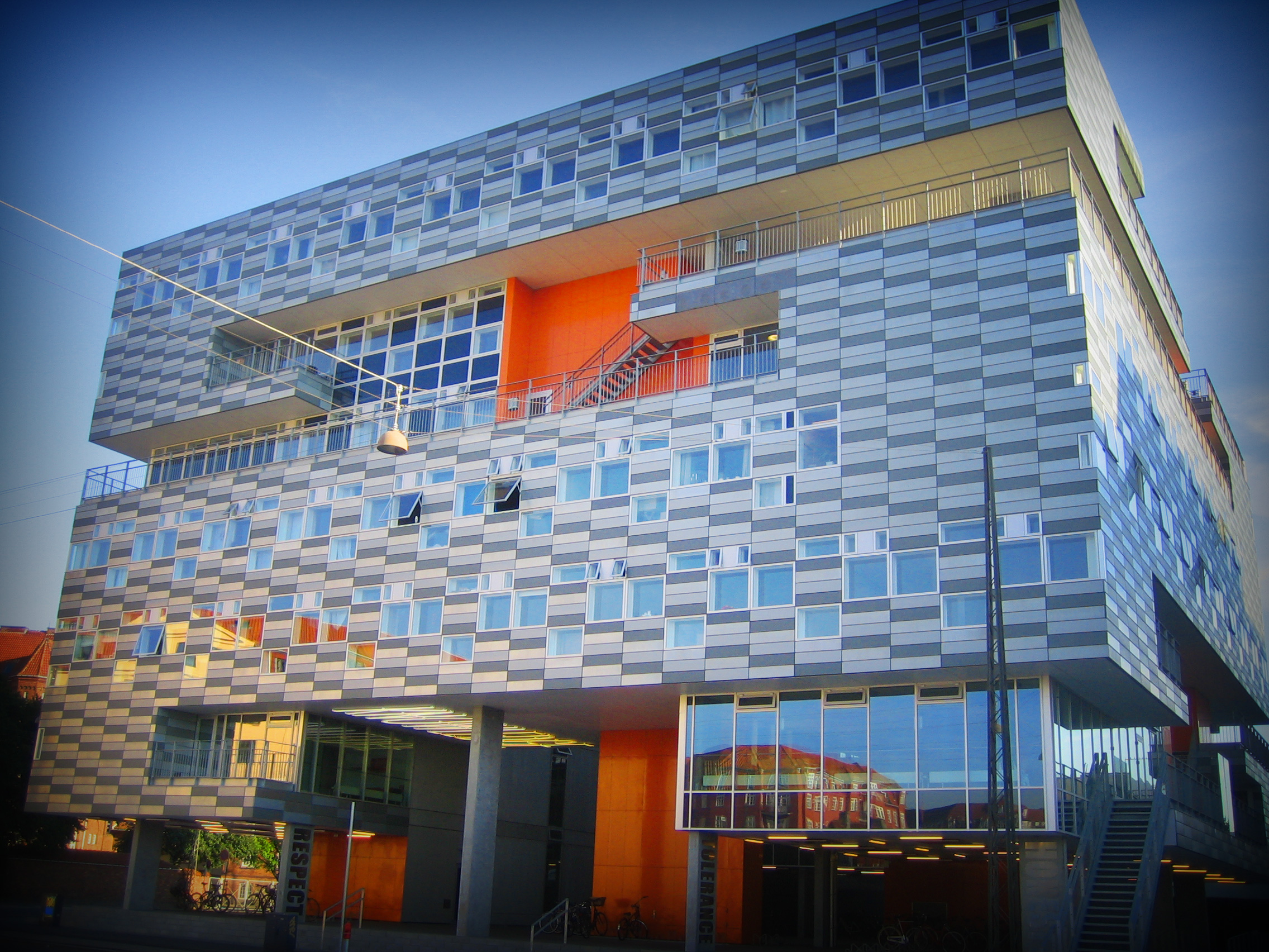 Bikuben Kollegium in Copenhagen, Denmark